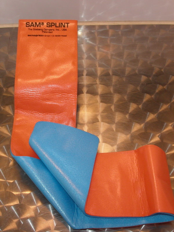 SamSplint - gerade